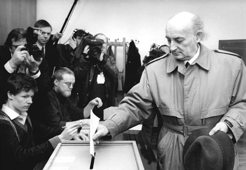 ADN-ZB Gahlbeck 18.3.90 Leipzig: Wahl 90. Fotoblitze empfingen DSU-Chef Hans Wilhelm Ebeling im Wahllokal im Informationszentrum auf dem Sachsenplatz.